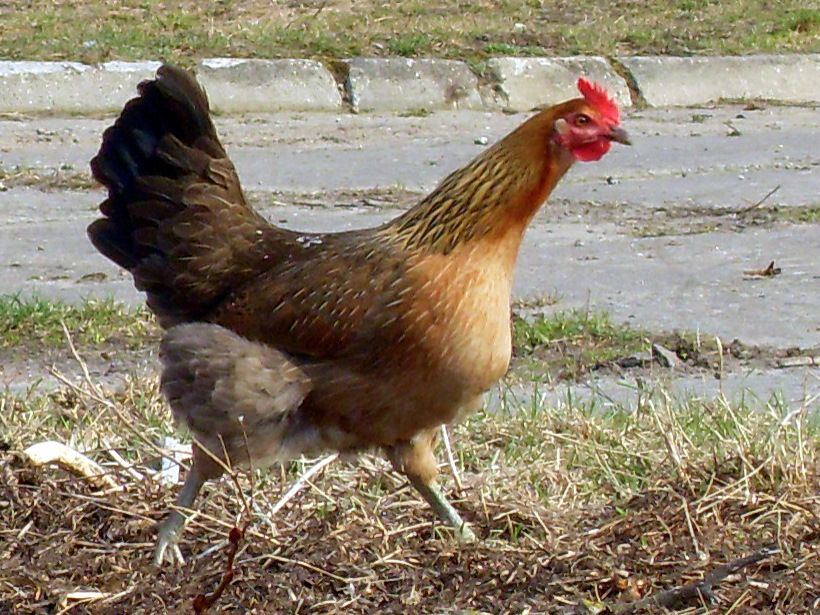 Zielononóżka kuropatwiana w Gąskowie.